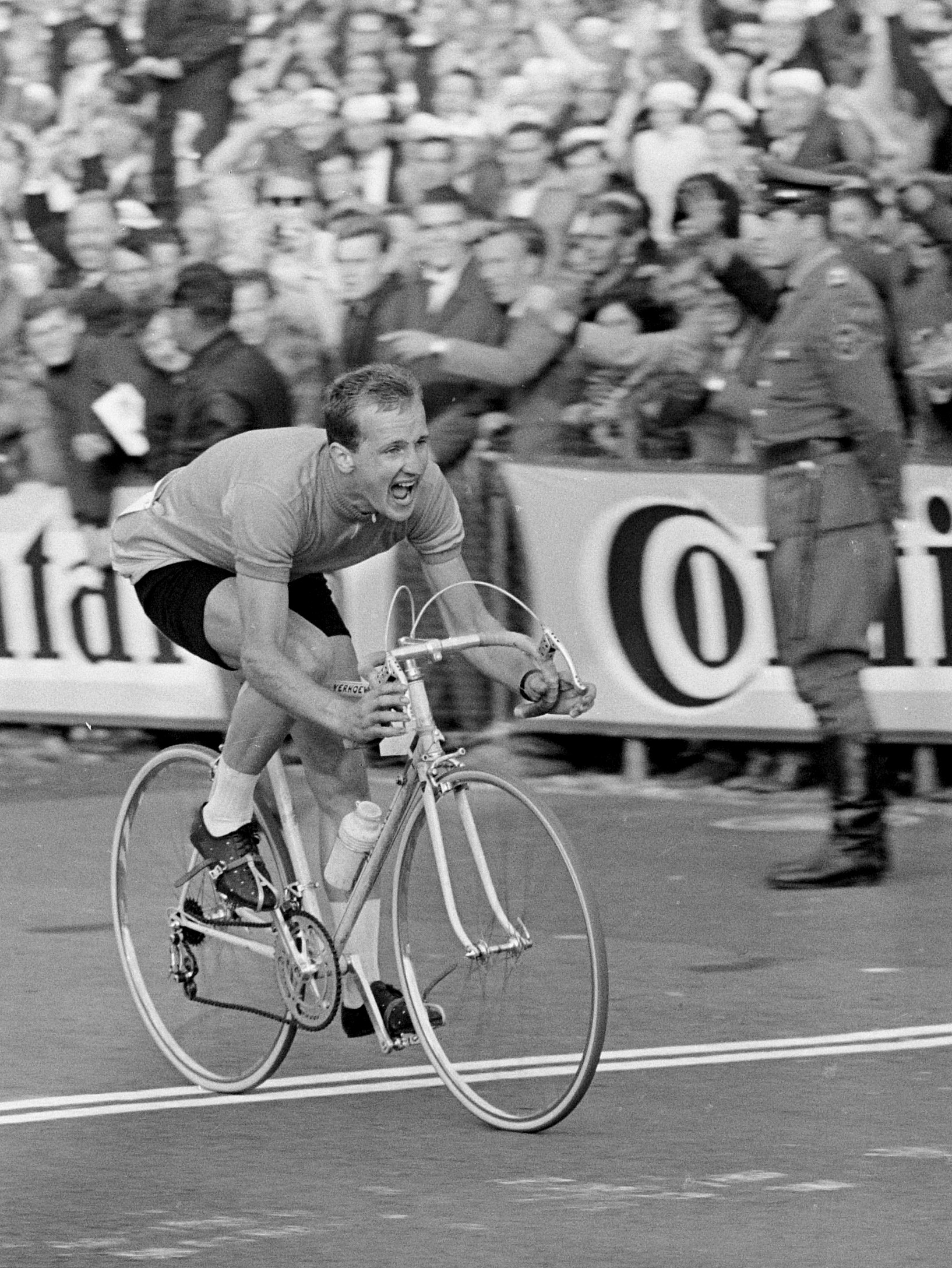 Wereldkampioenschappen Wielrennen op Nurburgring 1966, Evert Dolman gaat als eerste door de finish